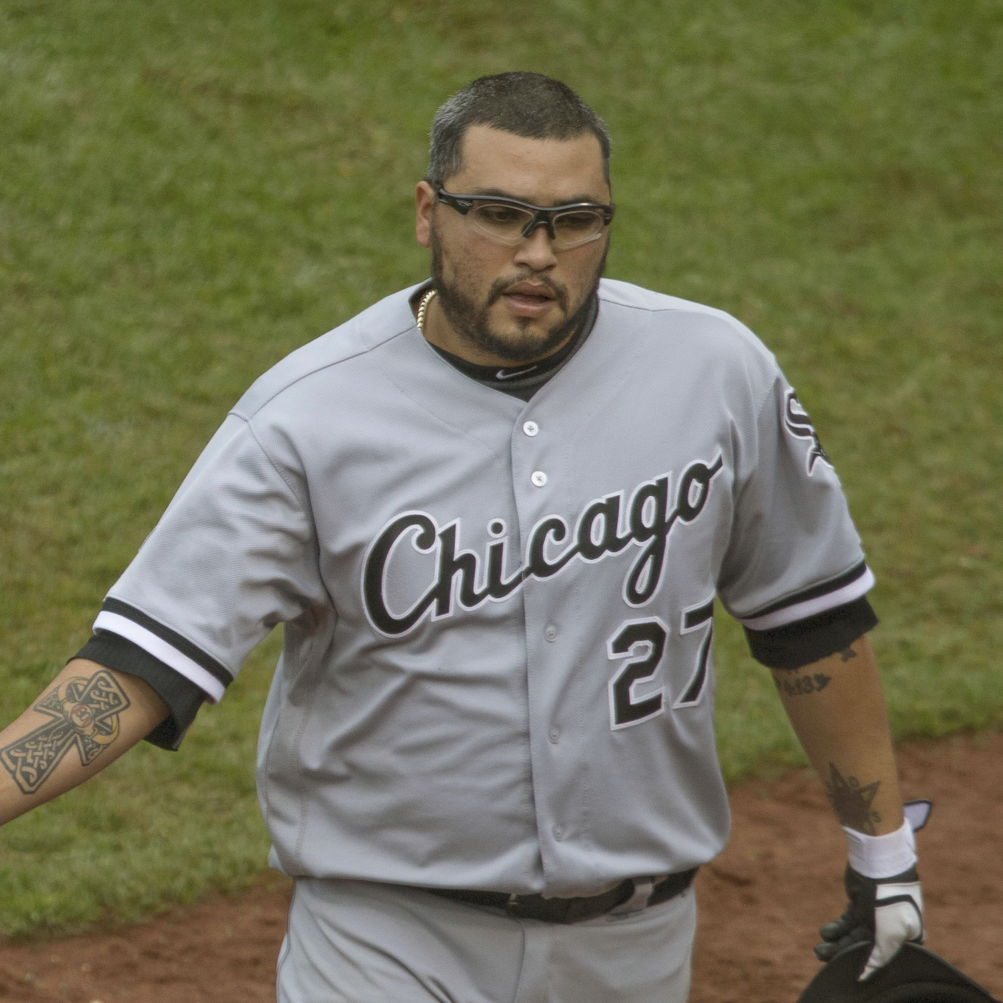 Dioner Navarro